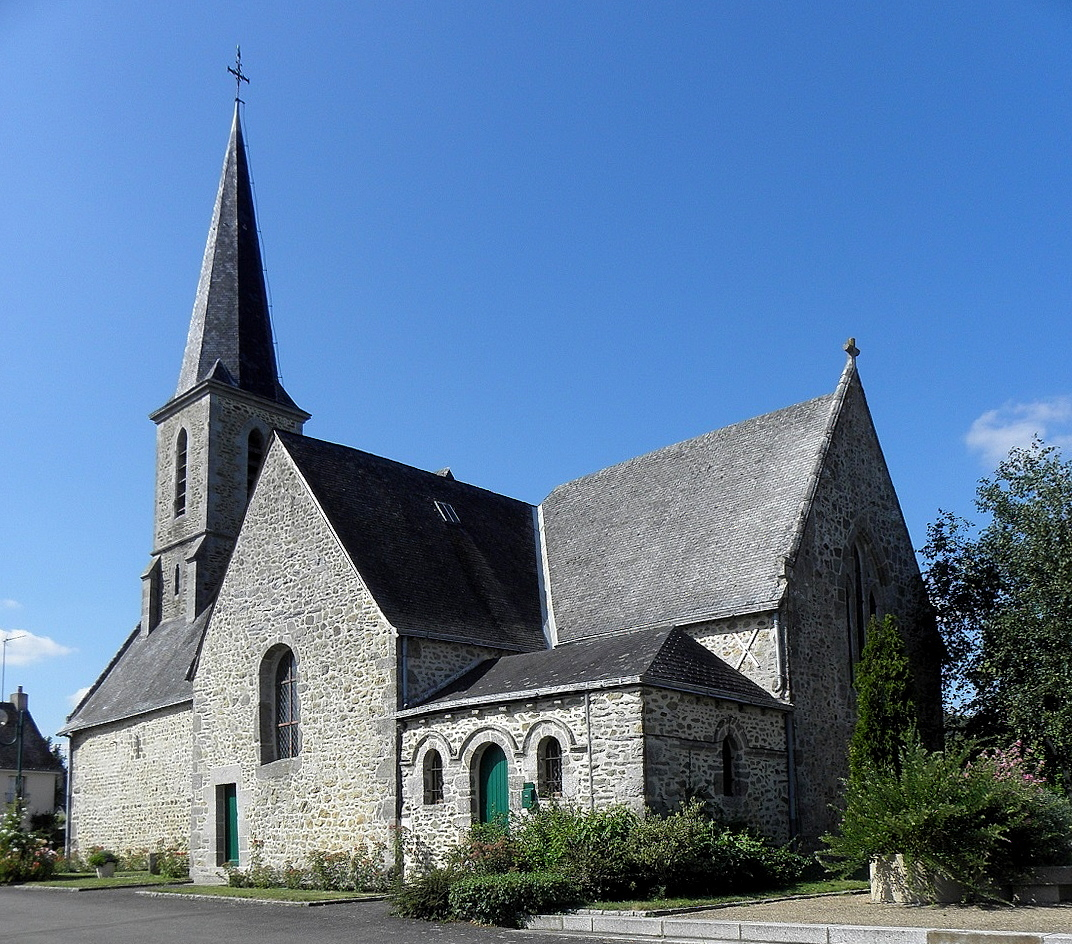 Église Saint-Cénéry de Parigné-sur-Braye (53).